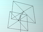 Quad antenna 2 elements